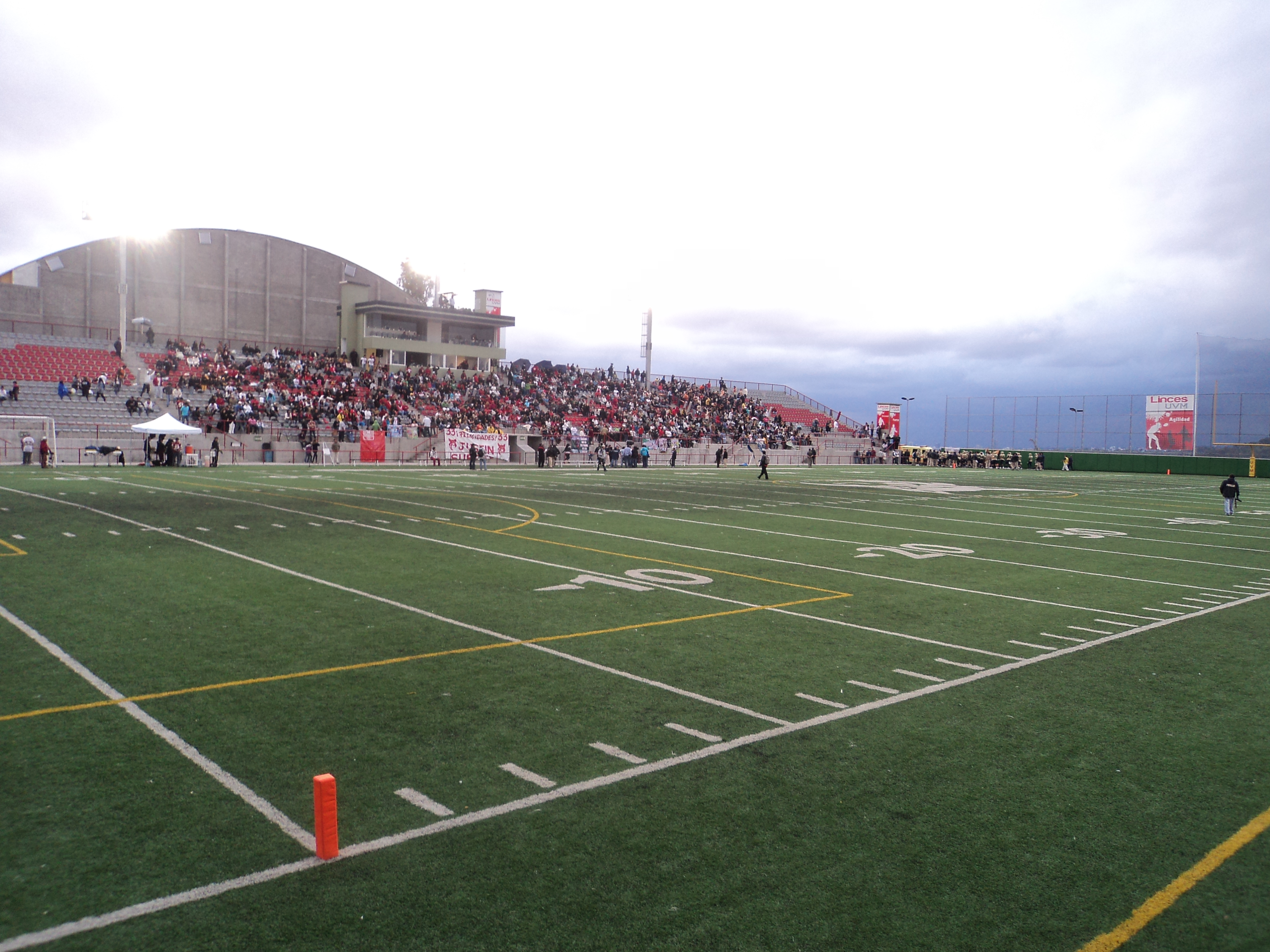 Estadio Jose Ortega Martinez previo al partido Linces vs. Pumas CU de la temporada 2011 de la ONEFA